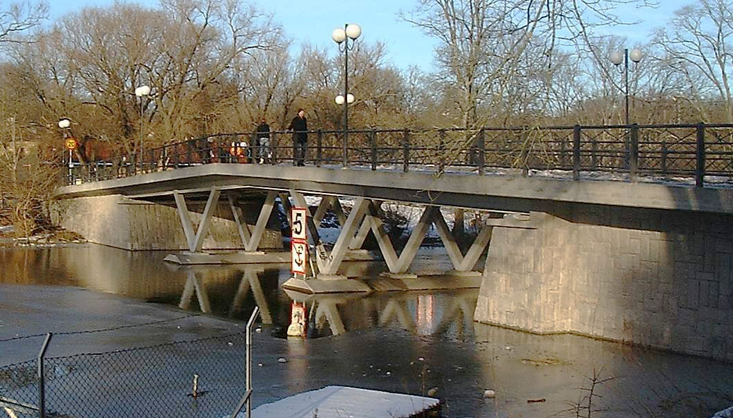 Långholmen in February 2007.